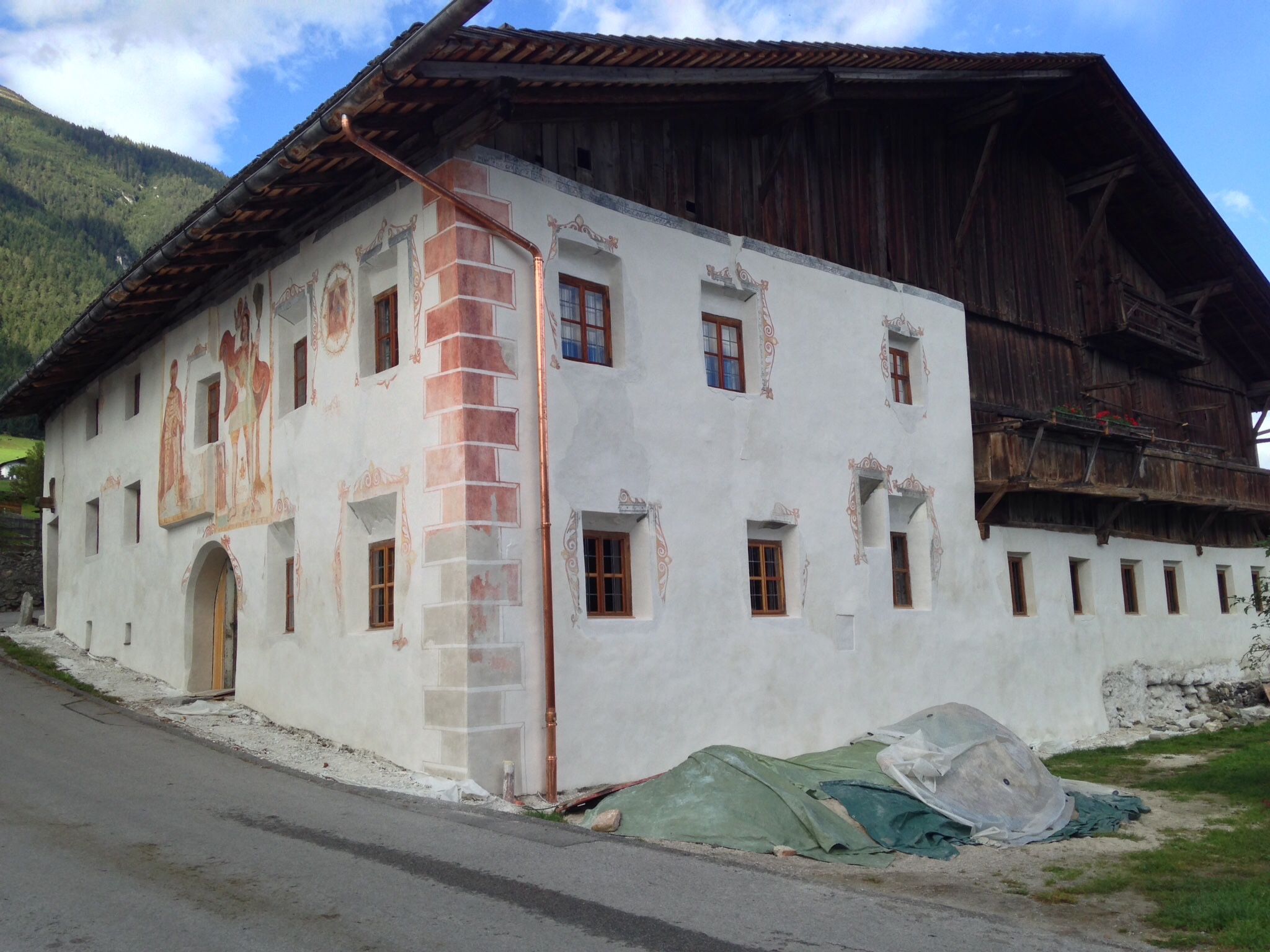 Bauernhof (Anlage), Moarhof Tögl